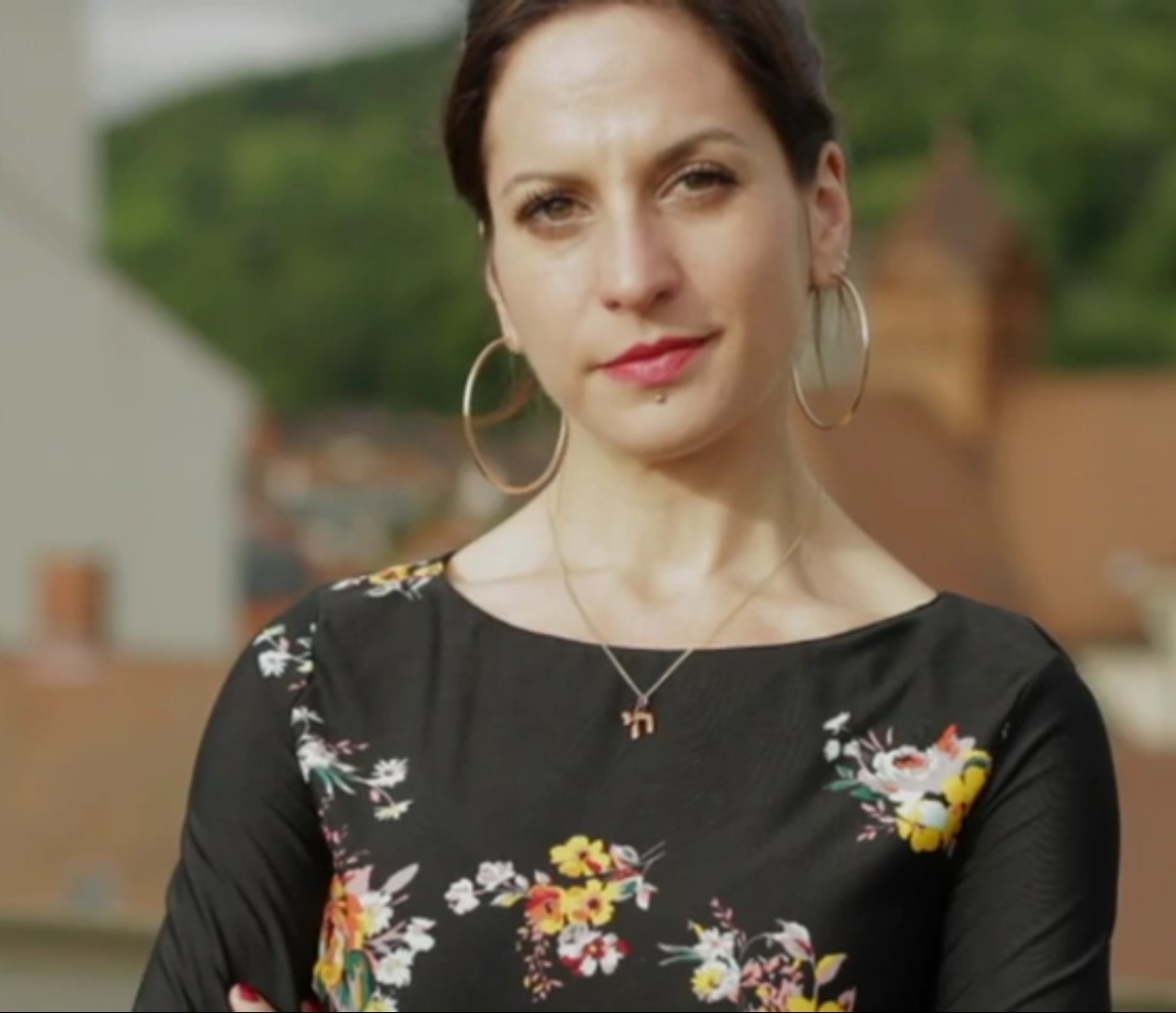 Hanna Donath ist Redakteurin bei "Familie & Co"., Wahlfreiburgerin und Schriftstellerin. Schon seit geraumer Zeit versucht Hannas Mutter, ihre 34-jährige Tochter zum Kinderkriegen zu bekommen. Ein Dilemma für die junge Frau, die sich -- als klassischer 30-Something -- noch nicht richtig dazu durchringen will. Ein Versuch über subtile Botschaften, oder die Geschichte hinter dem Tweet: "Mutter findet neue Wege für die Enkelsuche: „Du kannst jetzt Kinder kriegen. Ich habe gelesen, in Freiburg eröffnet eine jüdische Kita."